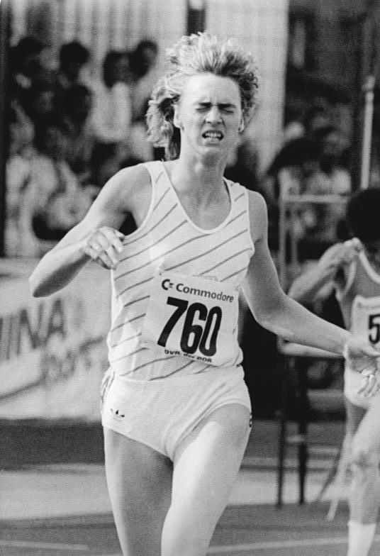 Heike Drechsler ADN-ZB Kluge 26.6.88 Rostock: 39. DDR-Meisterschaften in der Leichtathletik - In einem spannenden Duell über 200 Meter konnte sich Heike Drechsler (SC Motor Jena) vor Weltmeisterin Silke Möller (SC Empor Rostock) in der Jahresweltbestzeit von 21,84 s behaupten.